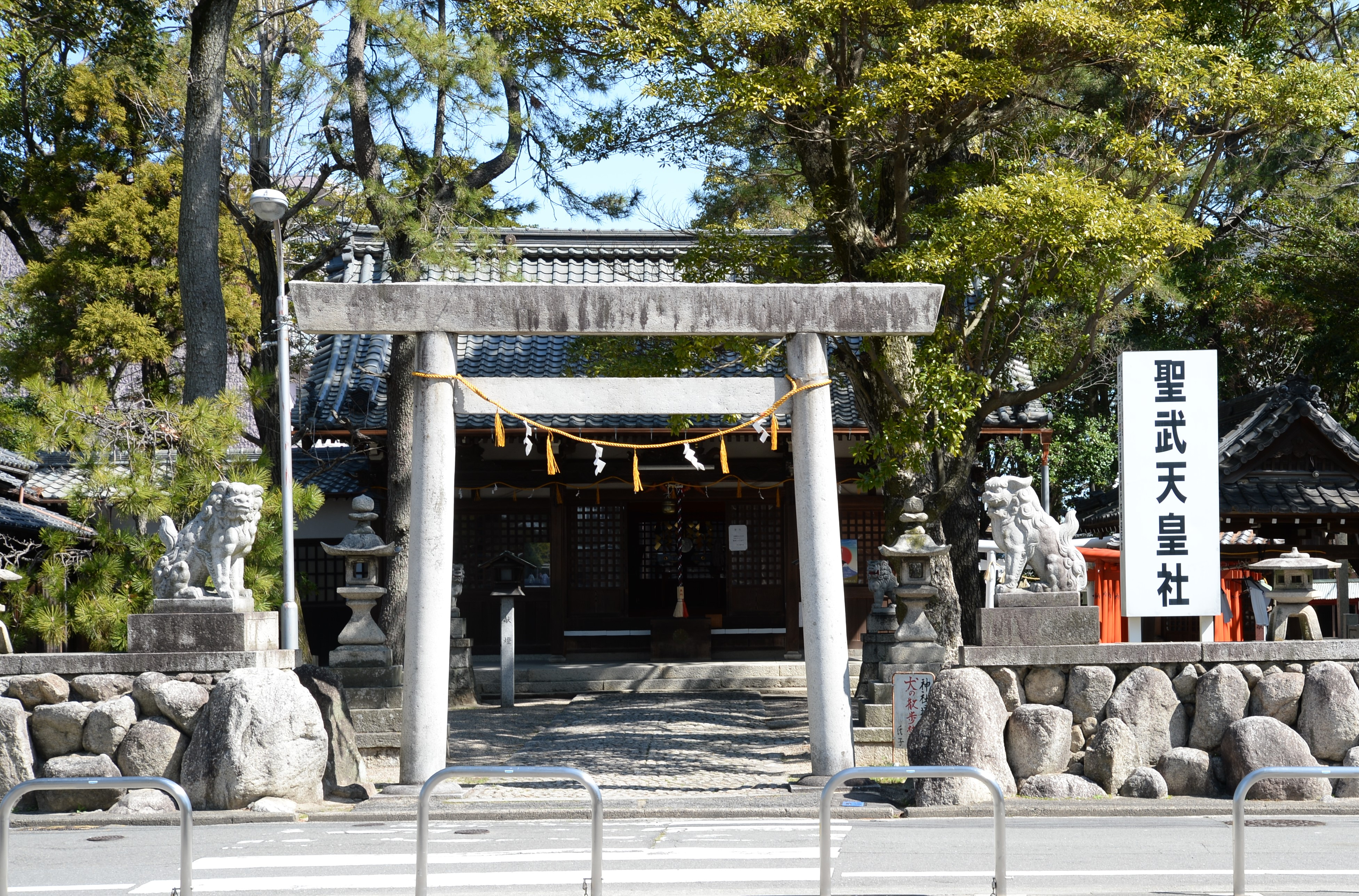 四日市市にある聖武天皇社の正面写真です。